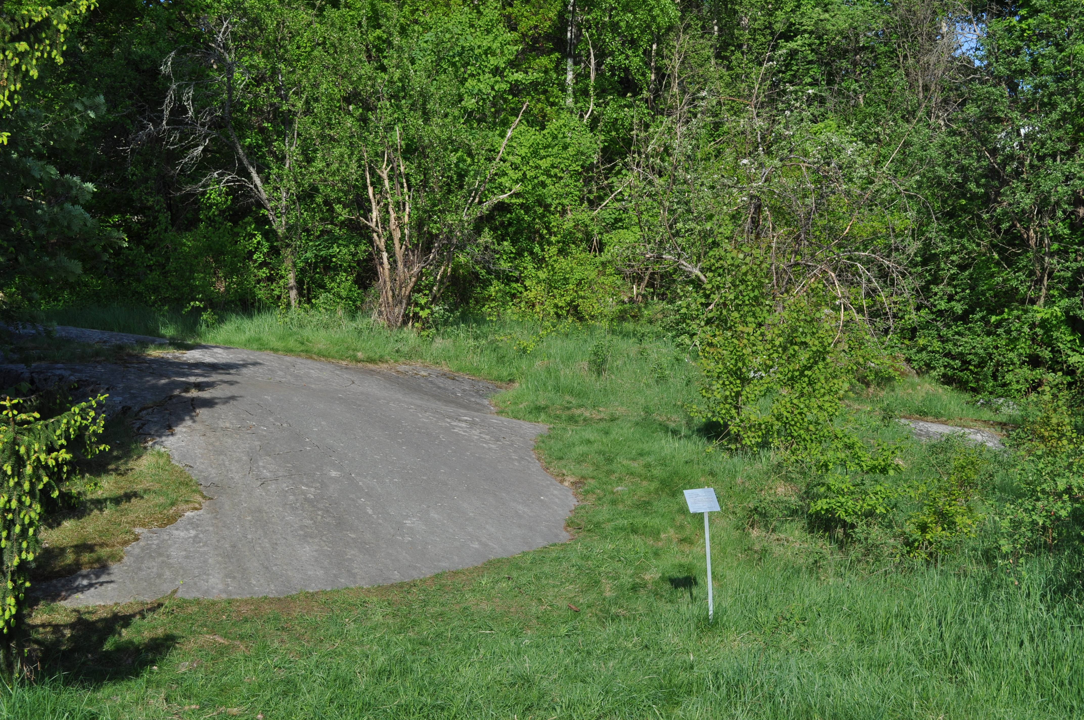 Runhällarna vid Sundby i Stockholms kommun: Till vänster syns U 80. Till höger skymtar U 81.